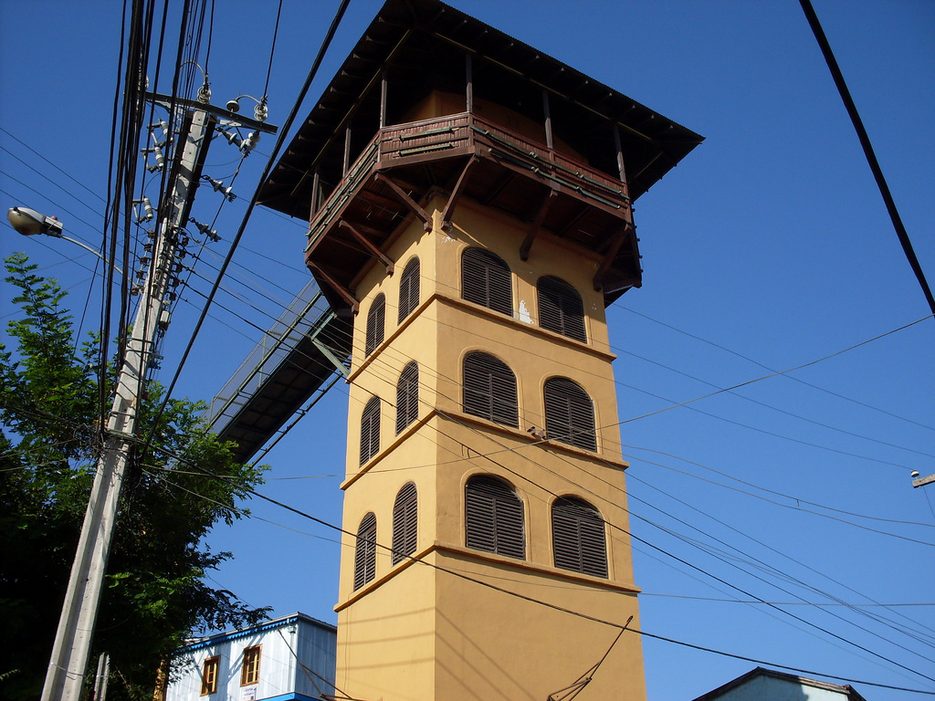 Vista desde el primer piso del ascensor Polanco (su parada intermedia).